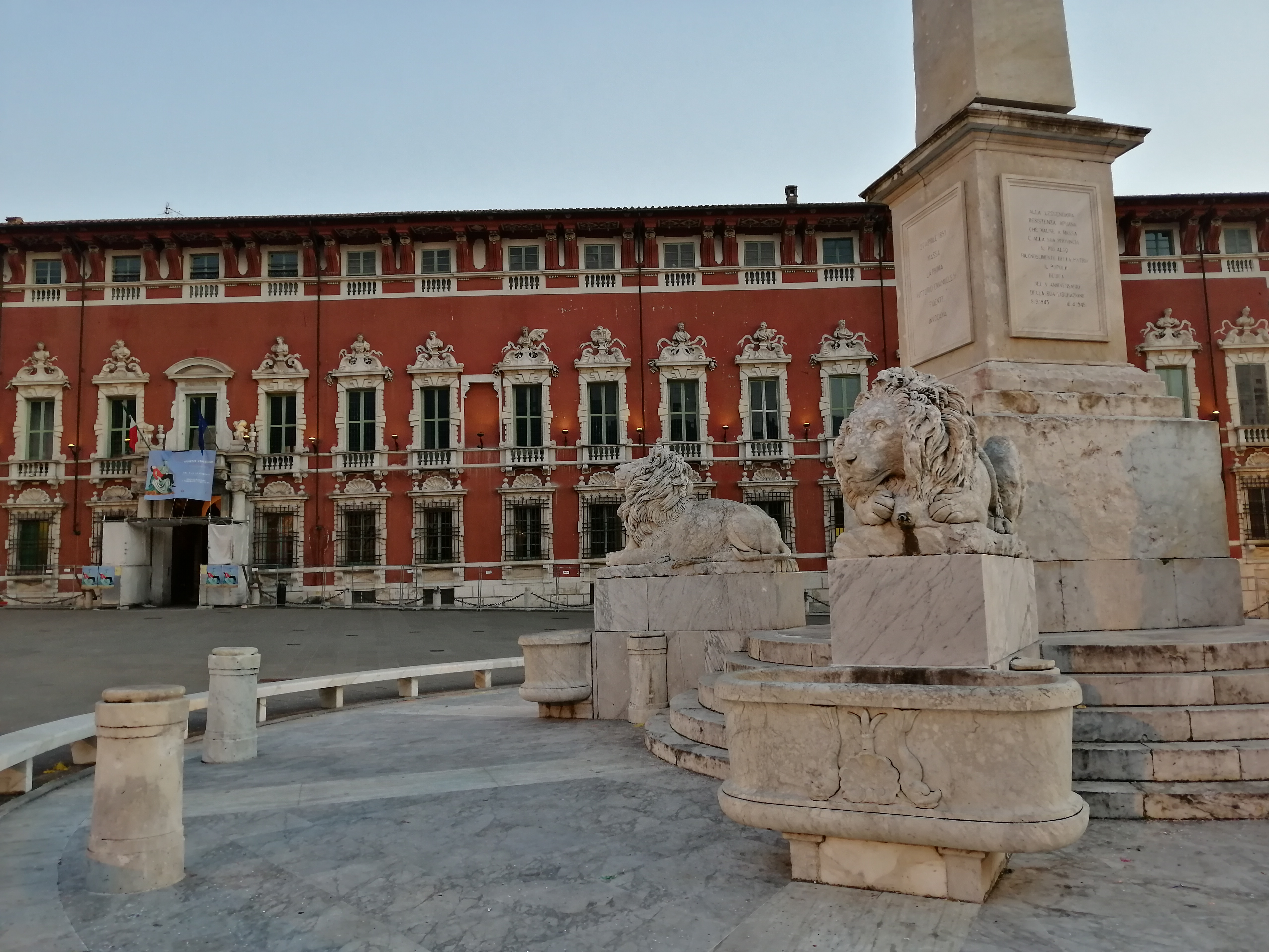 Il Palazzo Ducale è uno degli edifici più importanti di Massa e della Toscana. Attualmente sede della provincia di Massa Carrara